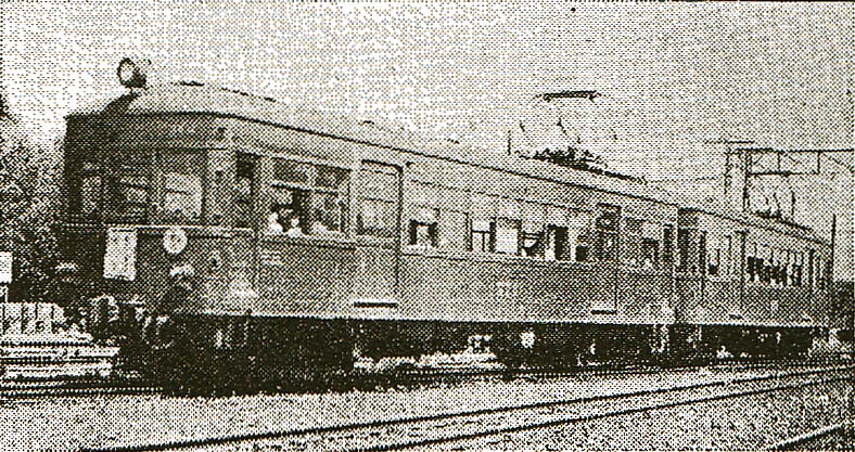 名鉄モ770形電車。モ772（先頭）とモ771（2両目）による2両編成。名鉄名古屋本線国府駅構内にて、1950年代撮影。